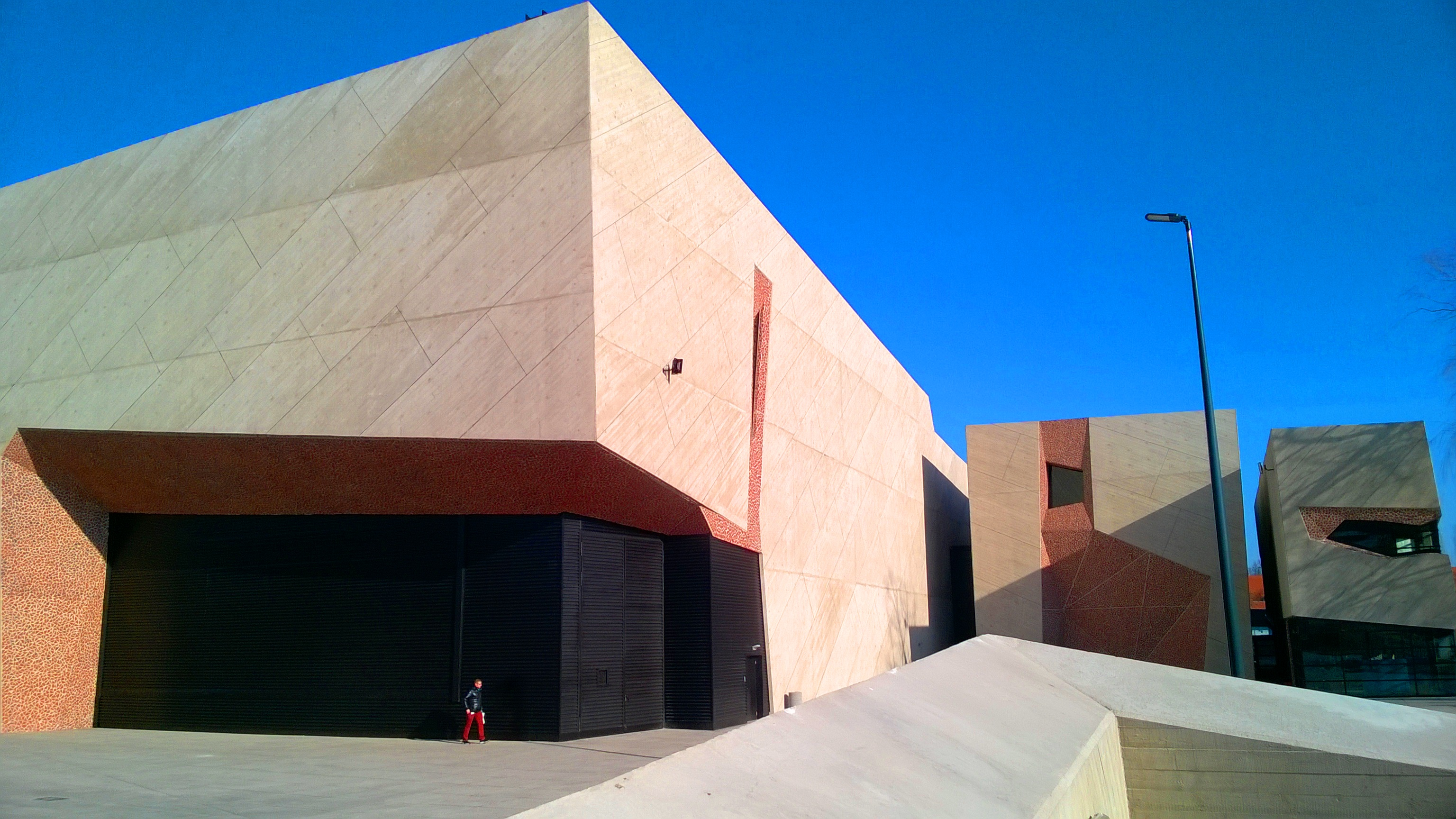 Centrum Kulturalno-Kongresowe Jordanki w Toruniu94